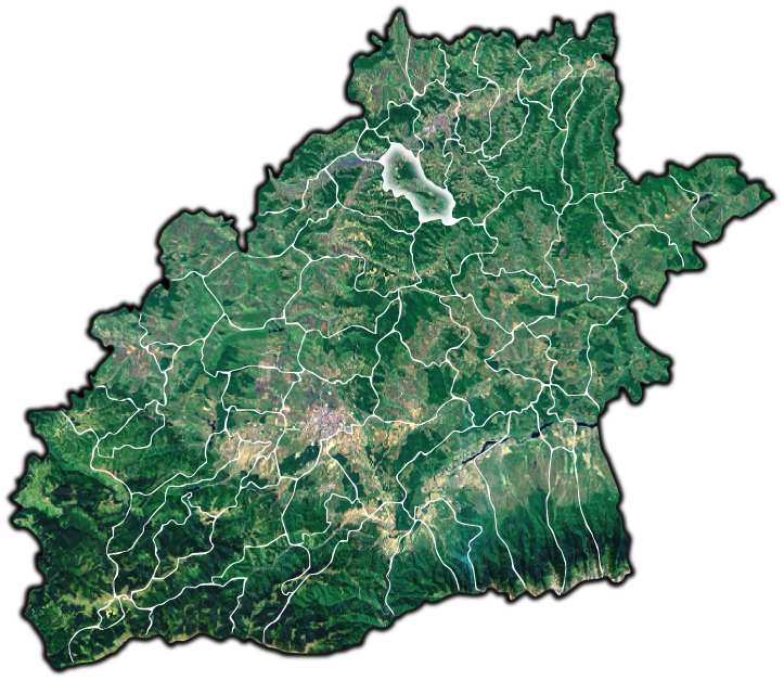 Valea Viilor jud Sibiu